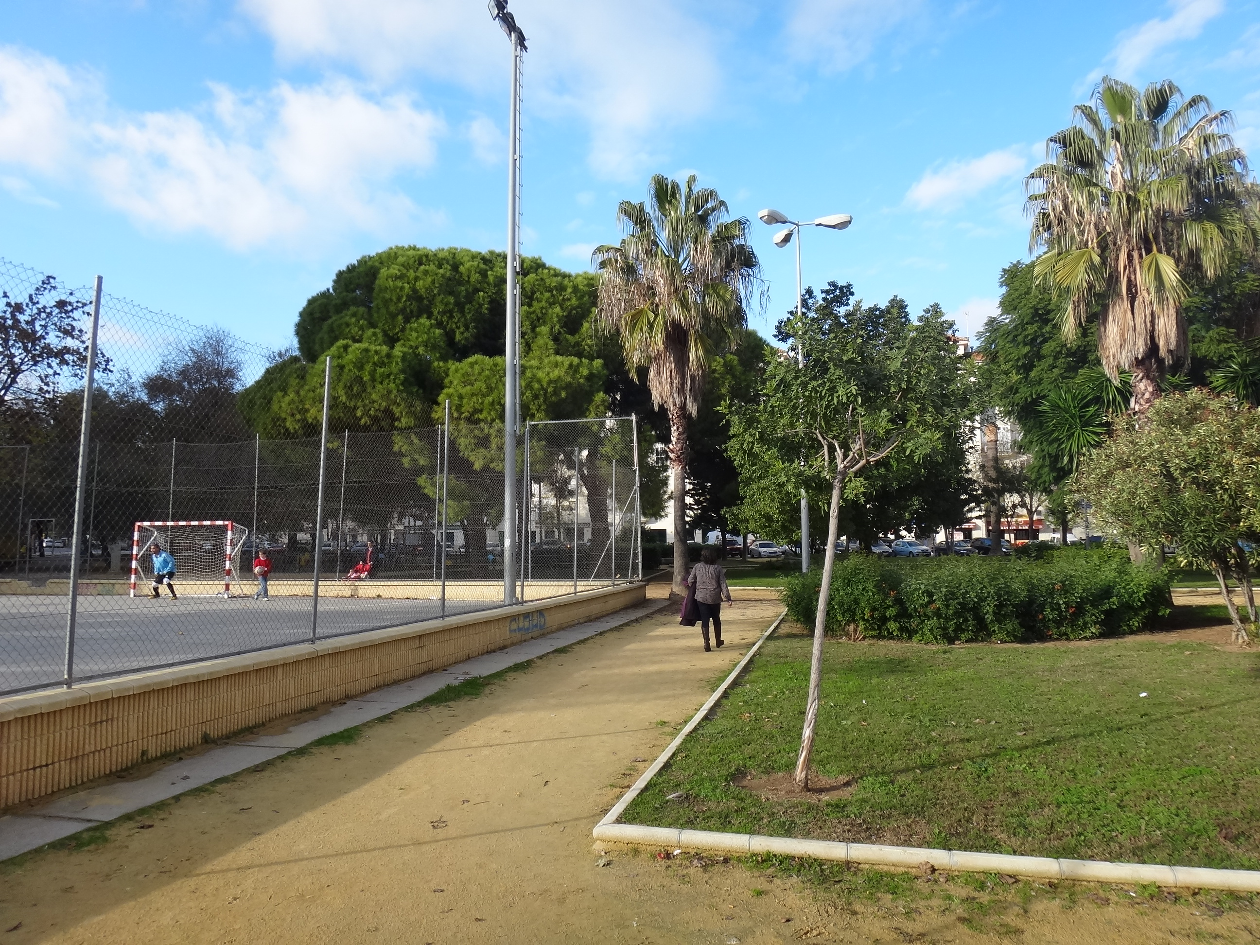 Parque Scout (Jerez, España)